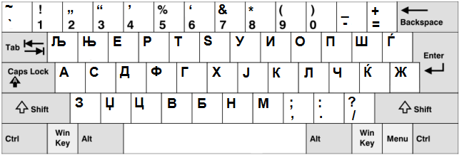 Windowsのマケドニア語キーボード